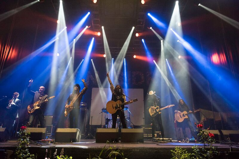 Por su parte, el otro gran escenario de San Isidro, el situado en la Pradera, volvía a ofrecer una tarde-noche de rock que alcanzaba su punto álgido a eso de la medianoche con Corizonas, banda surgida de la combinación de Arizona Baby y Los Coronas, que se inició con versiones de americana y ha llegado mucho más allá gracias a dos discos con canciones propias verdaderamente portentosas.